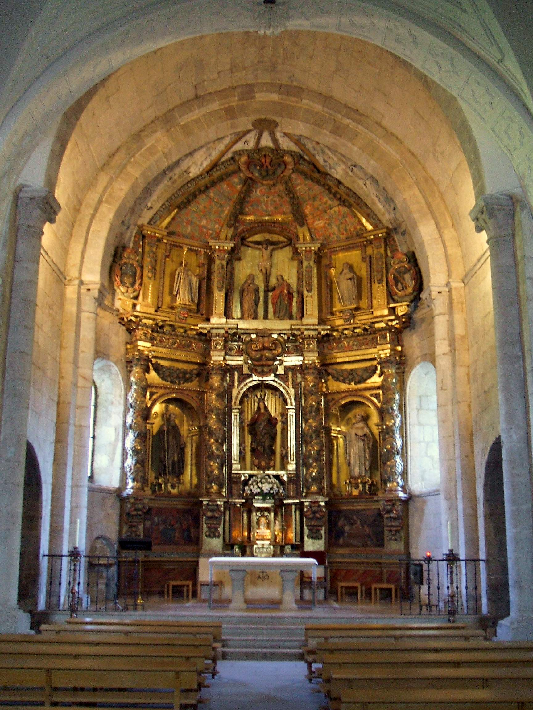 Iglesia del Monasterio trapense de Santa María de Carrizo, en Carrizo de la Ribera (León)